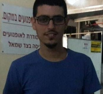 תמונת פרופיל